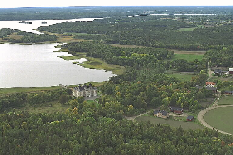 Motiv: Mälsåkers slott Nyckelord: Flygbilder, Raä-Fastigheter, Riksintressen Kategori: Herrgårds-/slottslandskap Mälsåkers slott